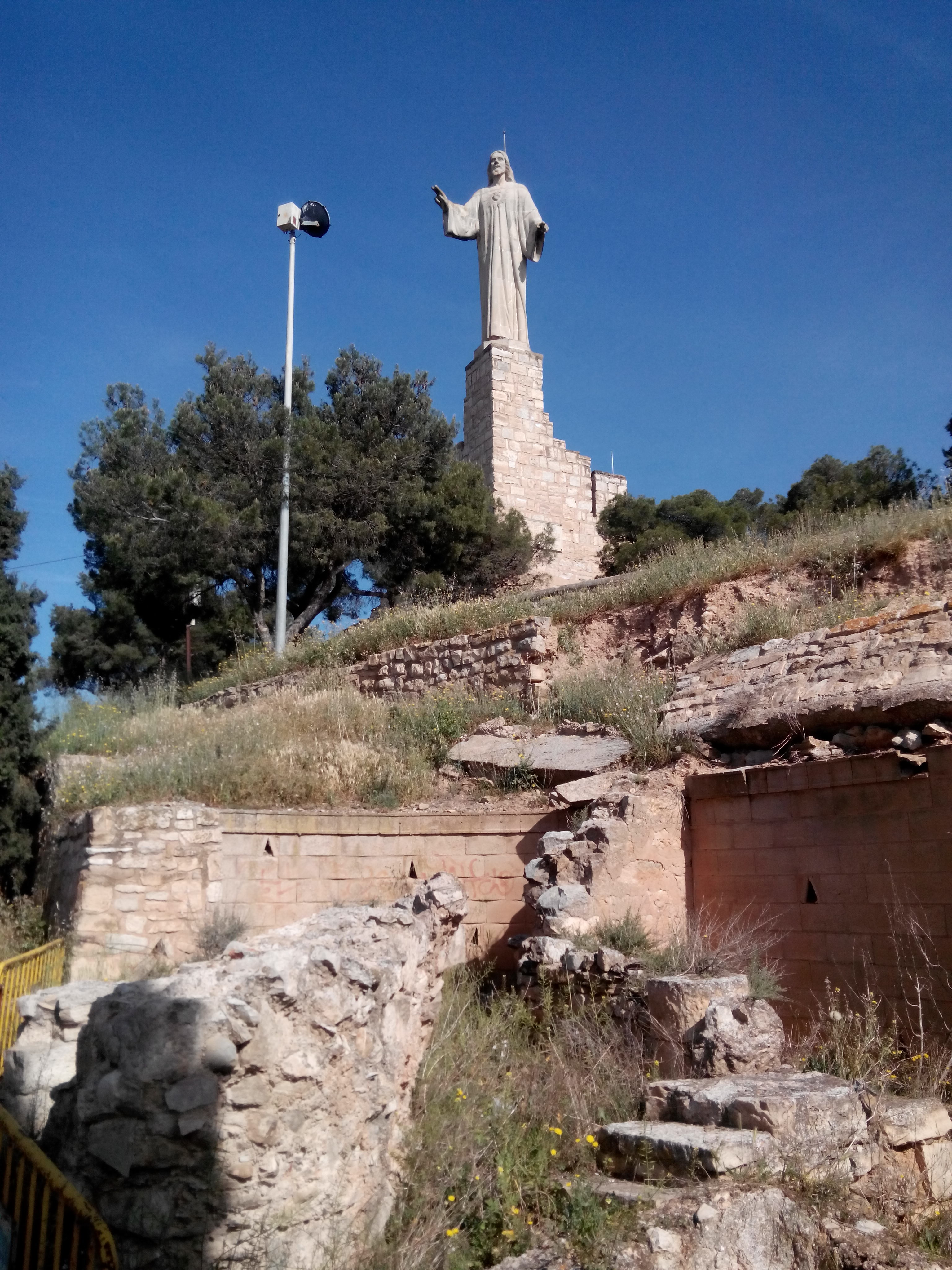 Castillo y Monte de Santa Bárbara